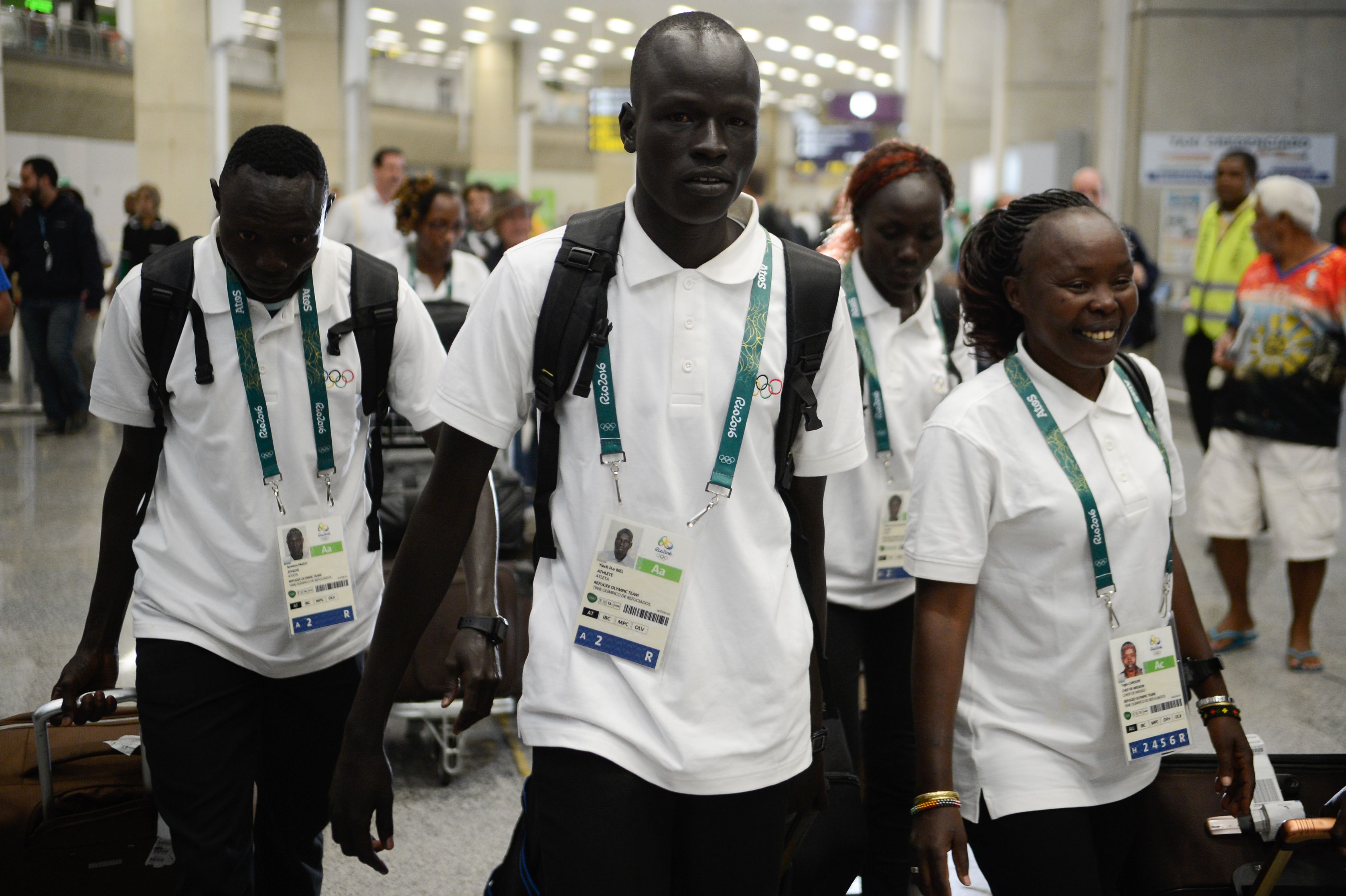 Rio de Janeiro - Integrantes da Equipe OlГ­mpica de Atletas Refugiados desembarcam no RioGaleГЈo. Os atletas sГЈo refugiados do SudГЈo do Sul que vivem no QuГЄnia e disputarГЈo diferentes modalidades de corrida nas competiГ§Гµes de atletismo (Foto: Tomaz Silva/AgГЄncia Brasil)